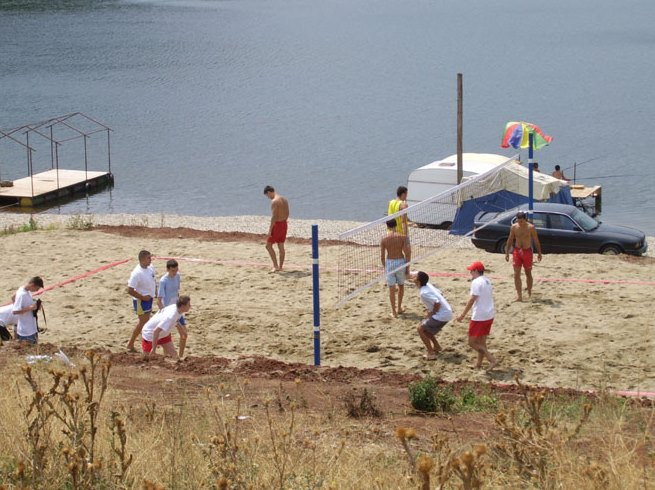 Volley-ball sur la plage. Partie de Volley-ball sur la plage. Srpskohrvatski / српскохрватски: Odbojka na pesku.